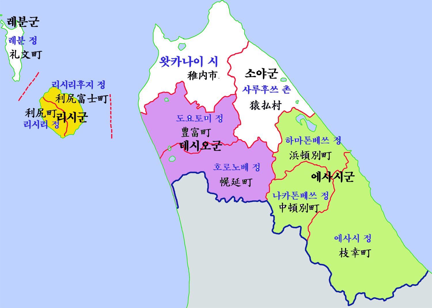 소야종합진흥국 행정구역도